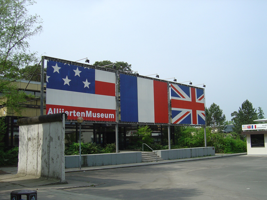 AlliiertenMuseum, Berlin